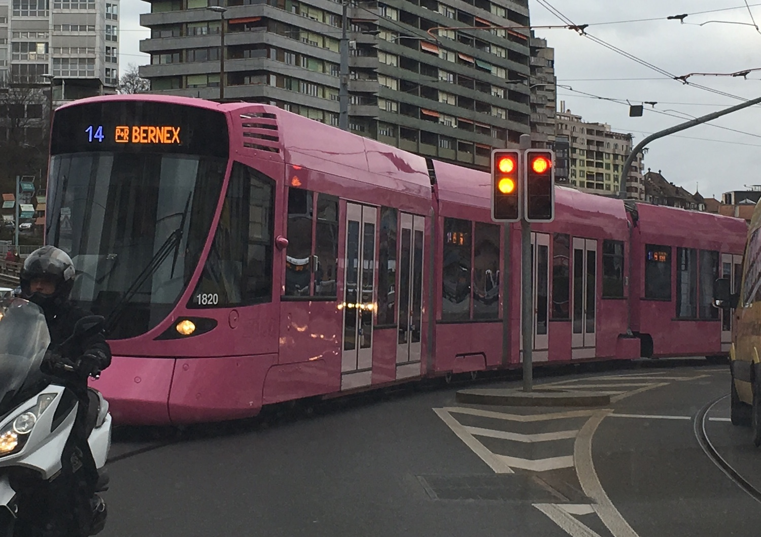 Le tramway rose de Pipilotti Rist